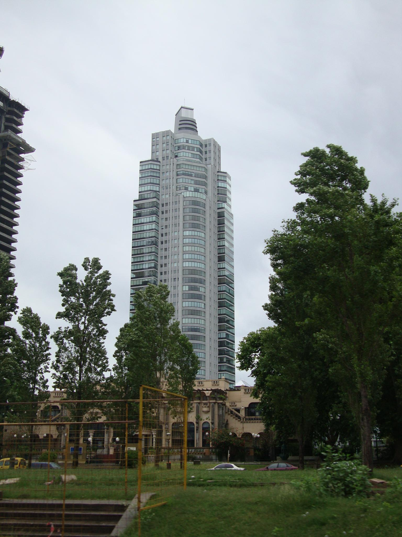 La Torre Renoir 1, vista desde la Av. Costanera. Puerto Madero, ciudad de Buenos Aires, Argentina.